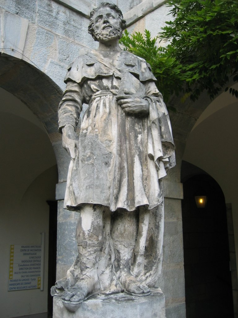 Statue de Saint Jacques le Majeur à l'Hopital Saint Jacques de Besançon (sur la route du pélérinage de Saint Jacques de Compostelle)